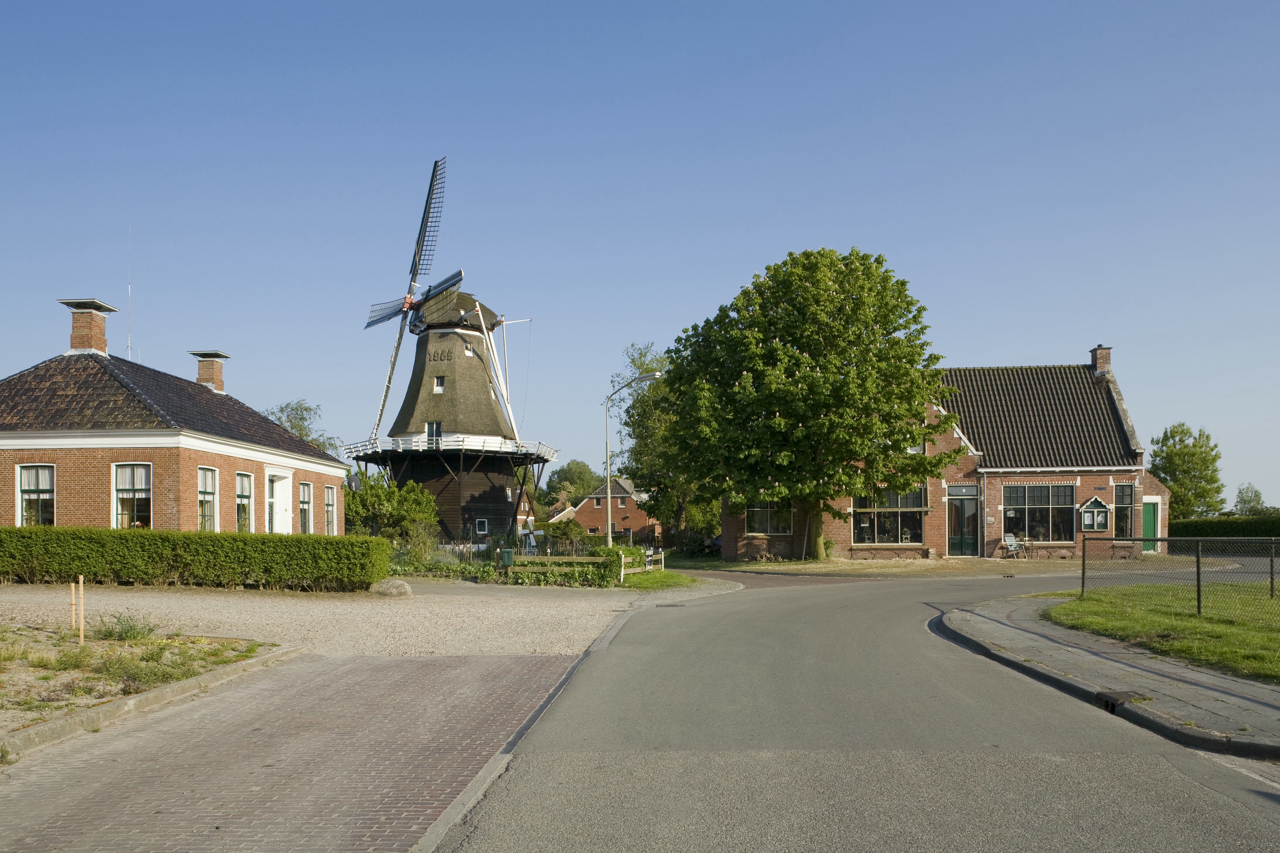 De Leeuw: Overzicht van de molen (opmerking: Project RRWR)